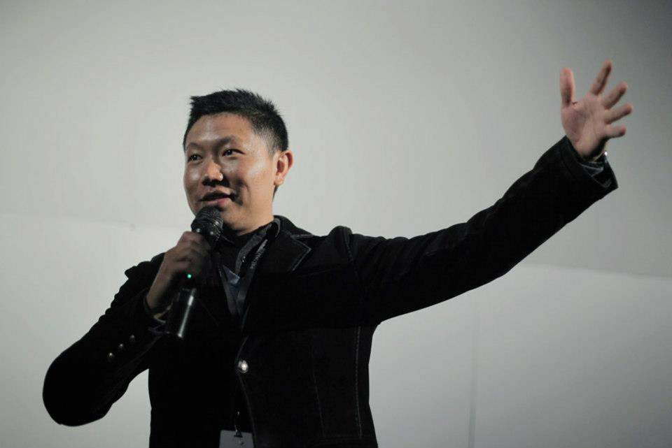 影後座談會